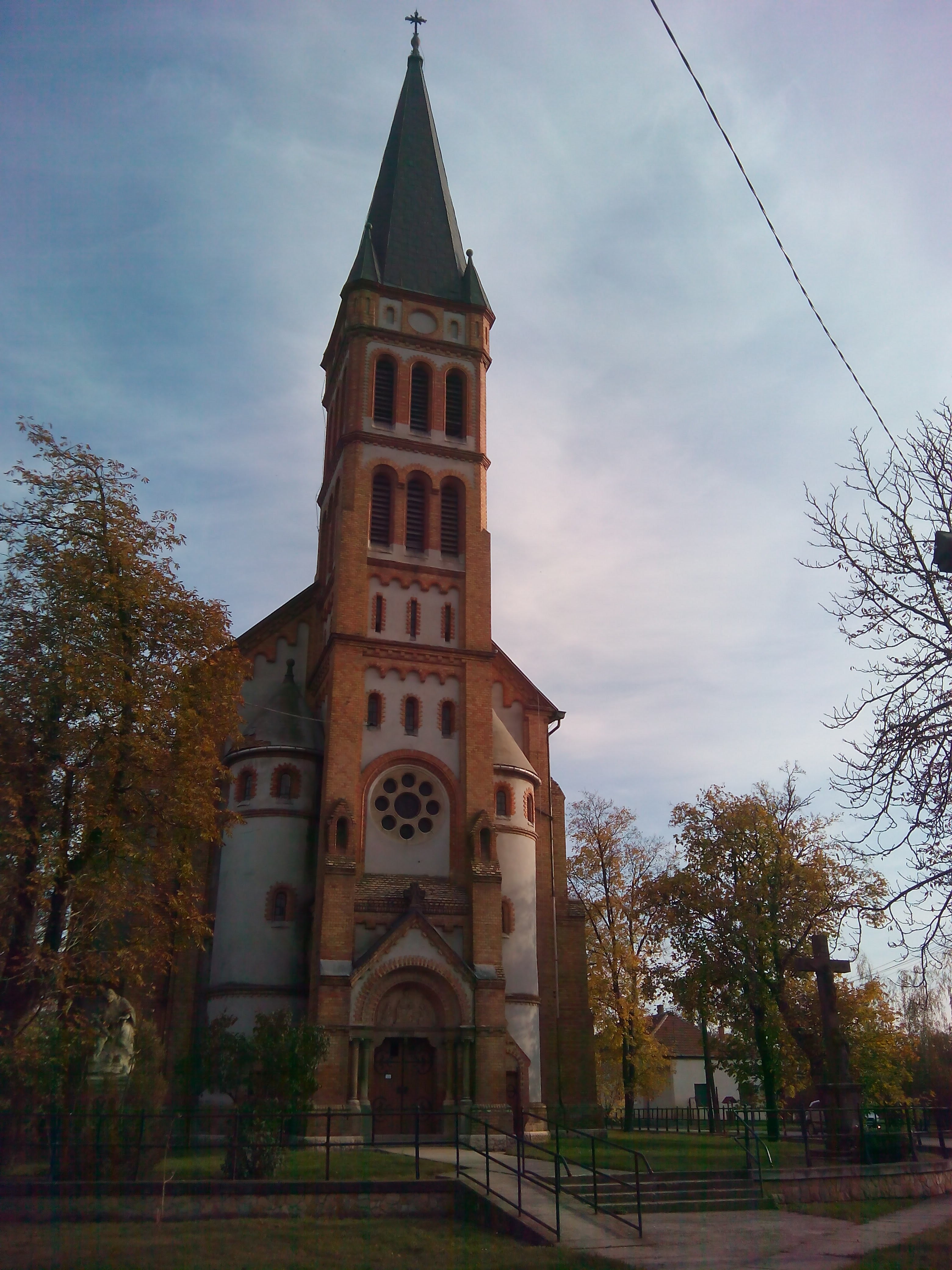 Jászkisér római katolikus templom